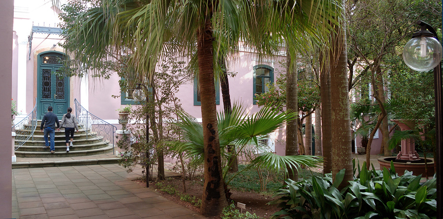 Jardins do Solar dos Câmara, Porto Alegre, Brasil.